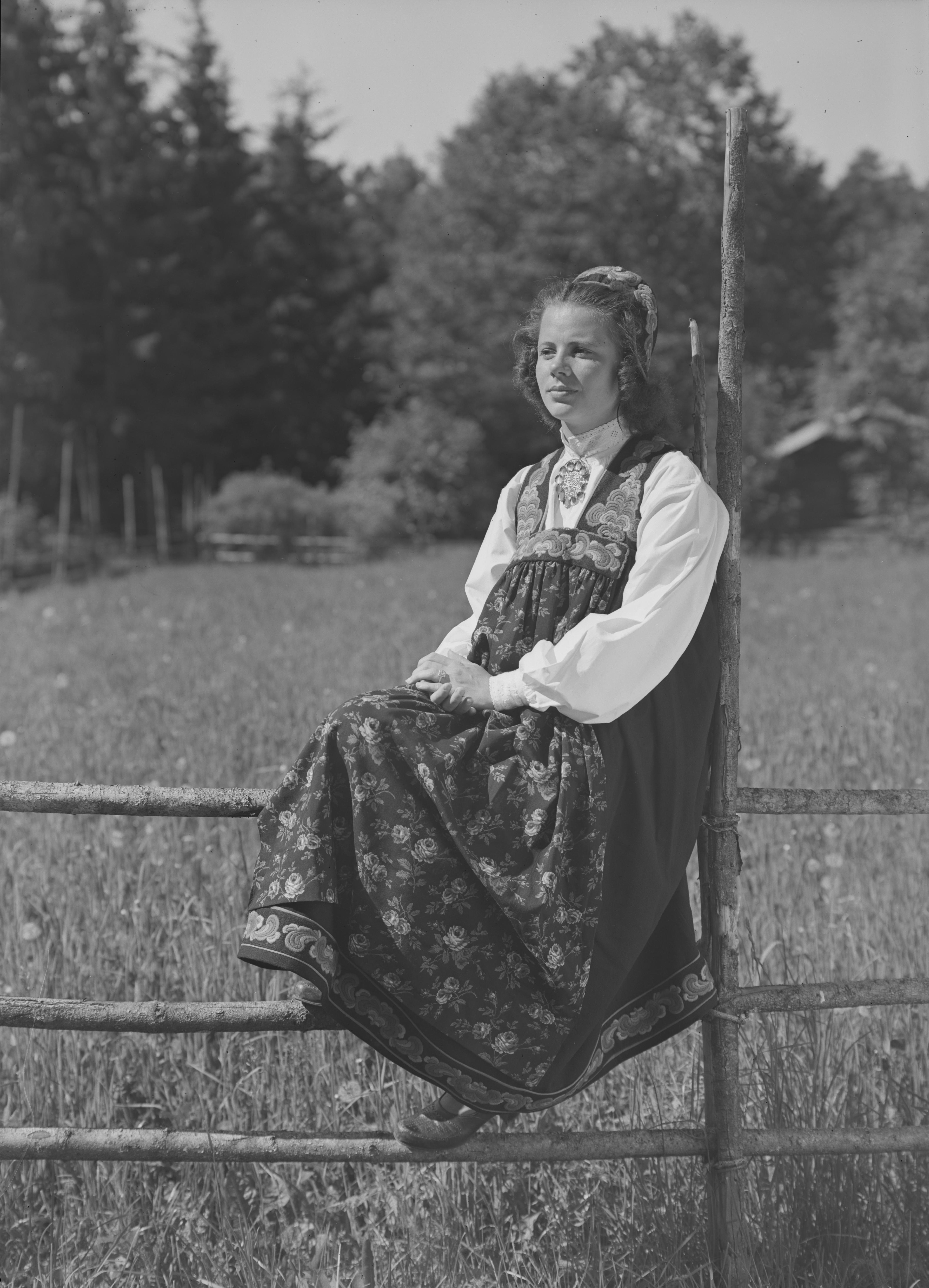 Bildet er hentet fra Nasjonalbibliotekets bildesamling. Anmerkninger til bildet var: Fotograf :Ukjent Bygdøy,Oslo, Oslo, Oslo